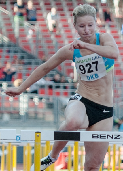 Deutsche Leichtathletik-Meisterschaften 2015: Frauen 100m Hürden - Franziska Hofmann